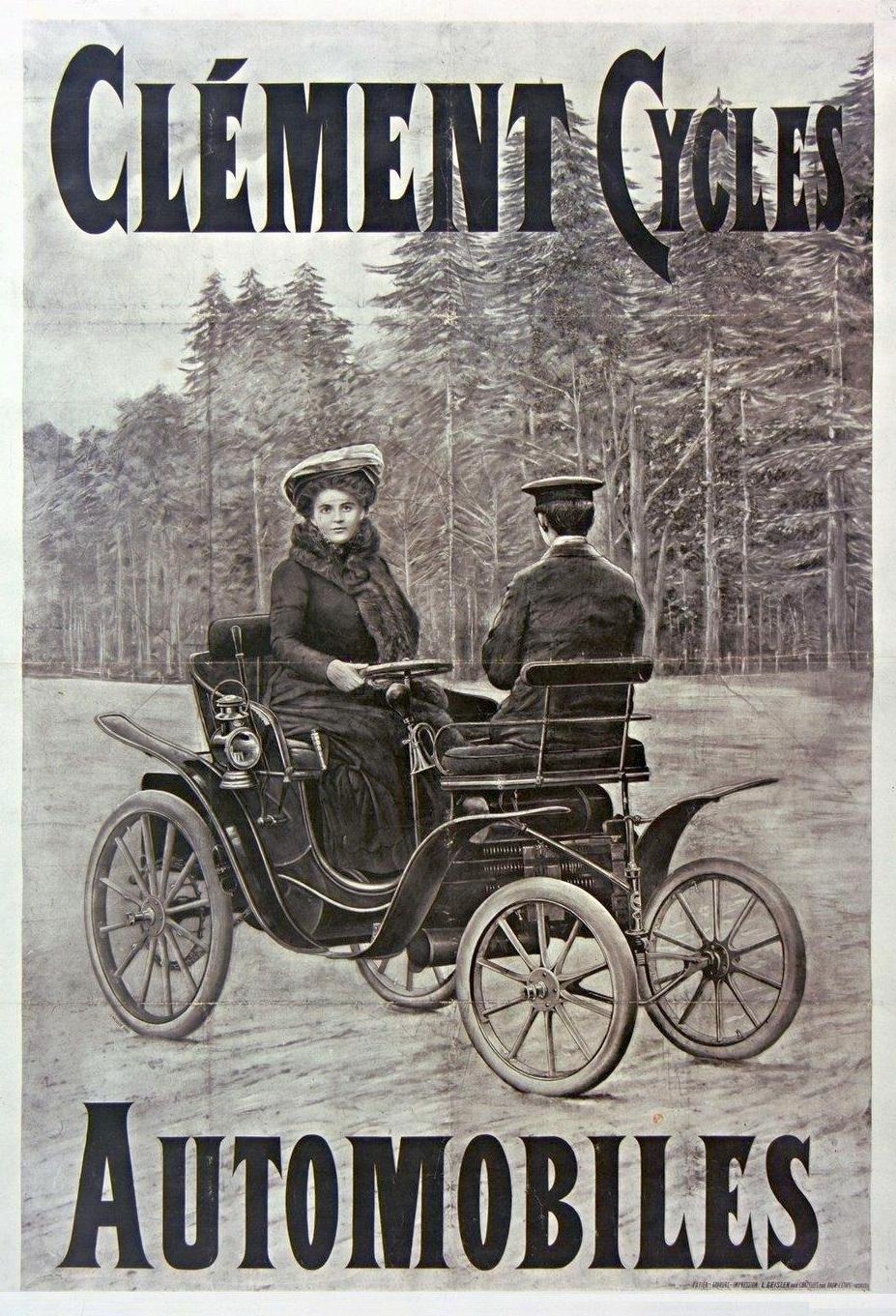 Titre : Clément cycles, automobiles : [affiche] / [non identifié] Éditeur : [s.n.] Éditeur : Papier, gravure et imression L. Geisler, auxChatelles, par Raon-l'Etape (Vosges) & Paris, 22, rue de la Faisanderie (Raon-L'Etape) Date d'édition : 1901 Sujet : Bicyclettes Sujet : Transports et communications Sujet : Automobiles Sujet : Cycles et motocycles Type : image fixe,estampe Langue : Français Format : 1 est. : impression photomécanique, coul. (monochrome) ; 120 x 85 cm Format : image/jpeg Droits : domaine public Identifiant : ark:/12148/btv1b9013407s Source : Bibliothèque nationale de France, ENT DN-1 (GEISLER,L.)-ROUL Relation : Provenance : bnf.fr Date de mise en ligne : 30/04/2011